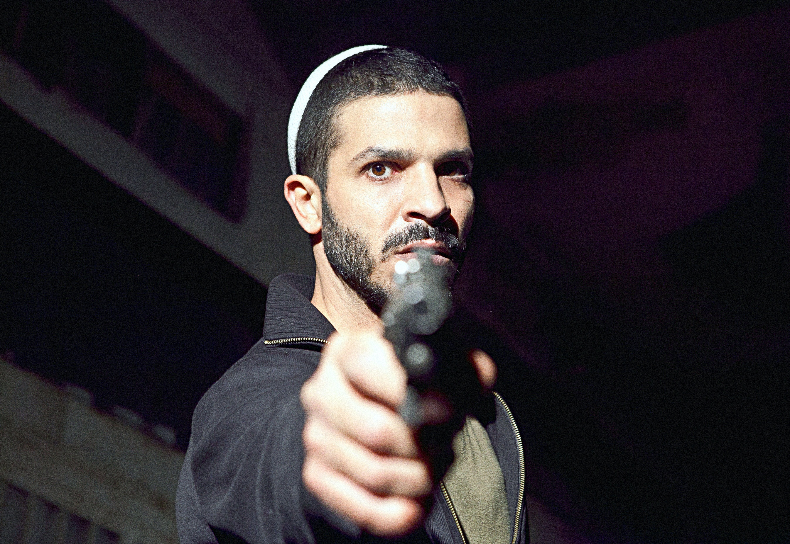 רועי אסף בסרט המשגיחים